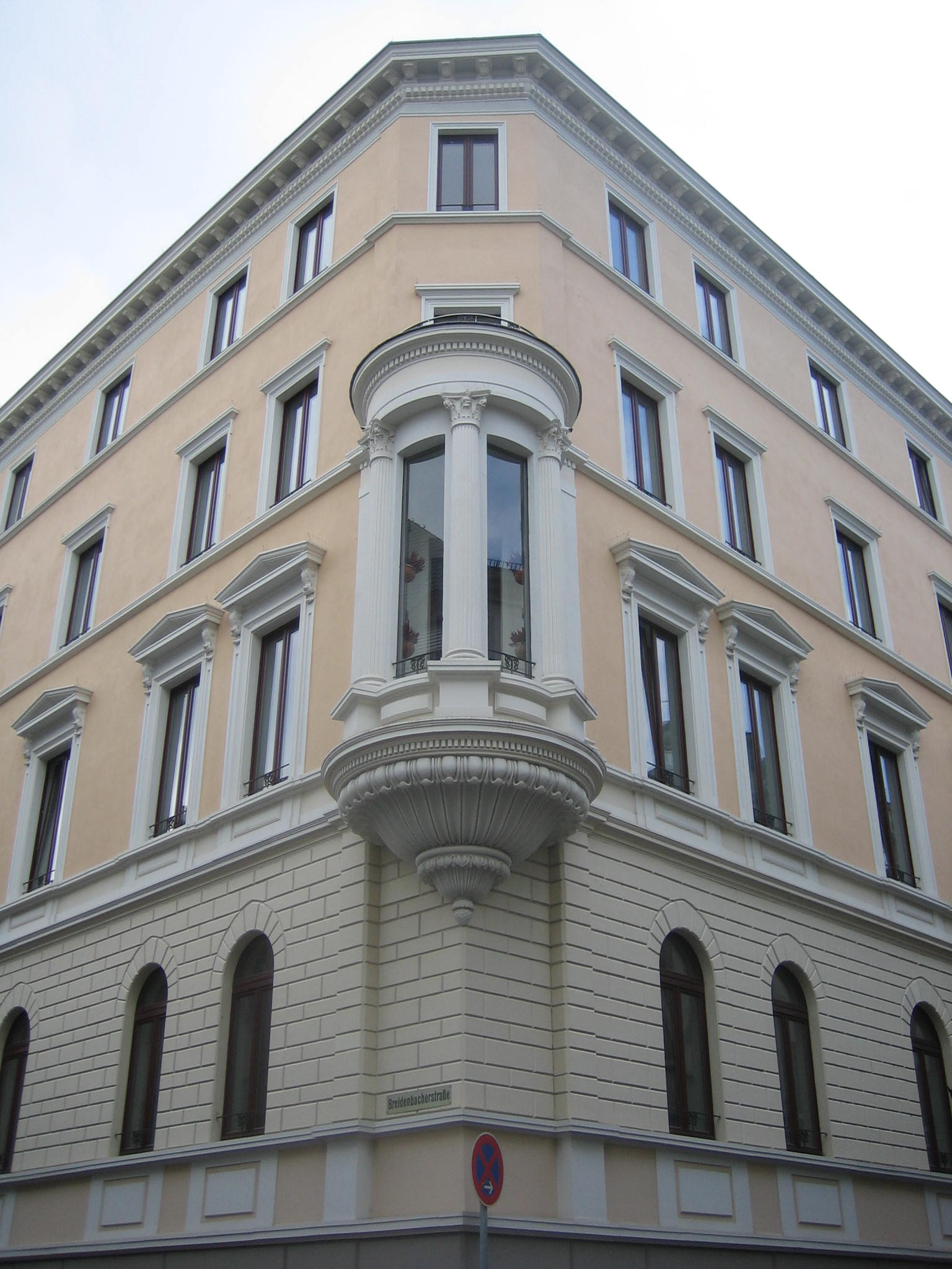 Wohnbebauung auf dem Kästrich Mitte des 19. Jahrhunderts; Wohnhaus Breidenbacherstraße 25.